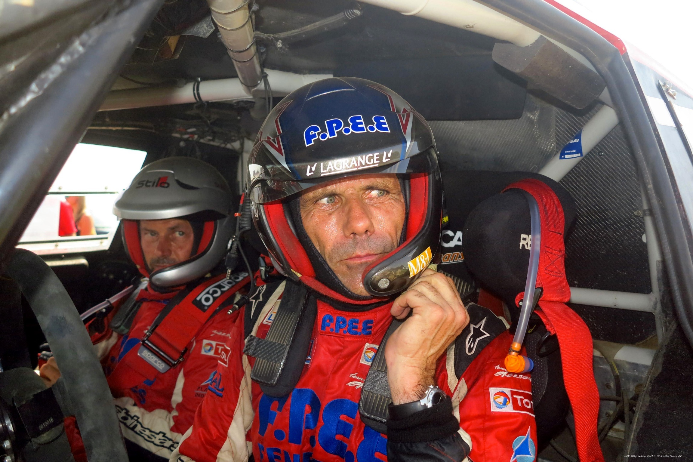 Silkway 2013